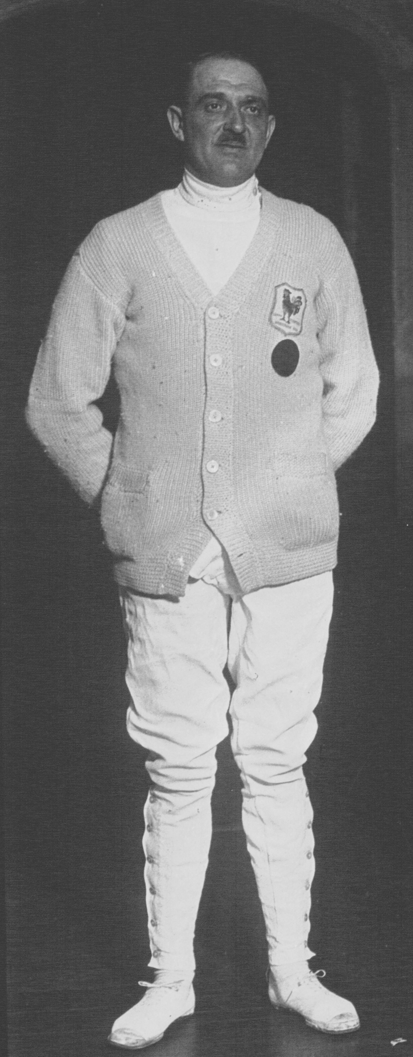 Philippe Cattiaux en 1930.